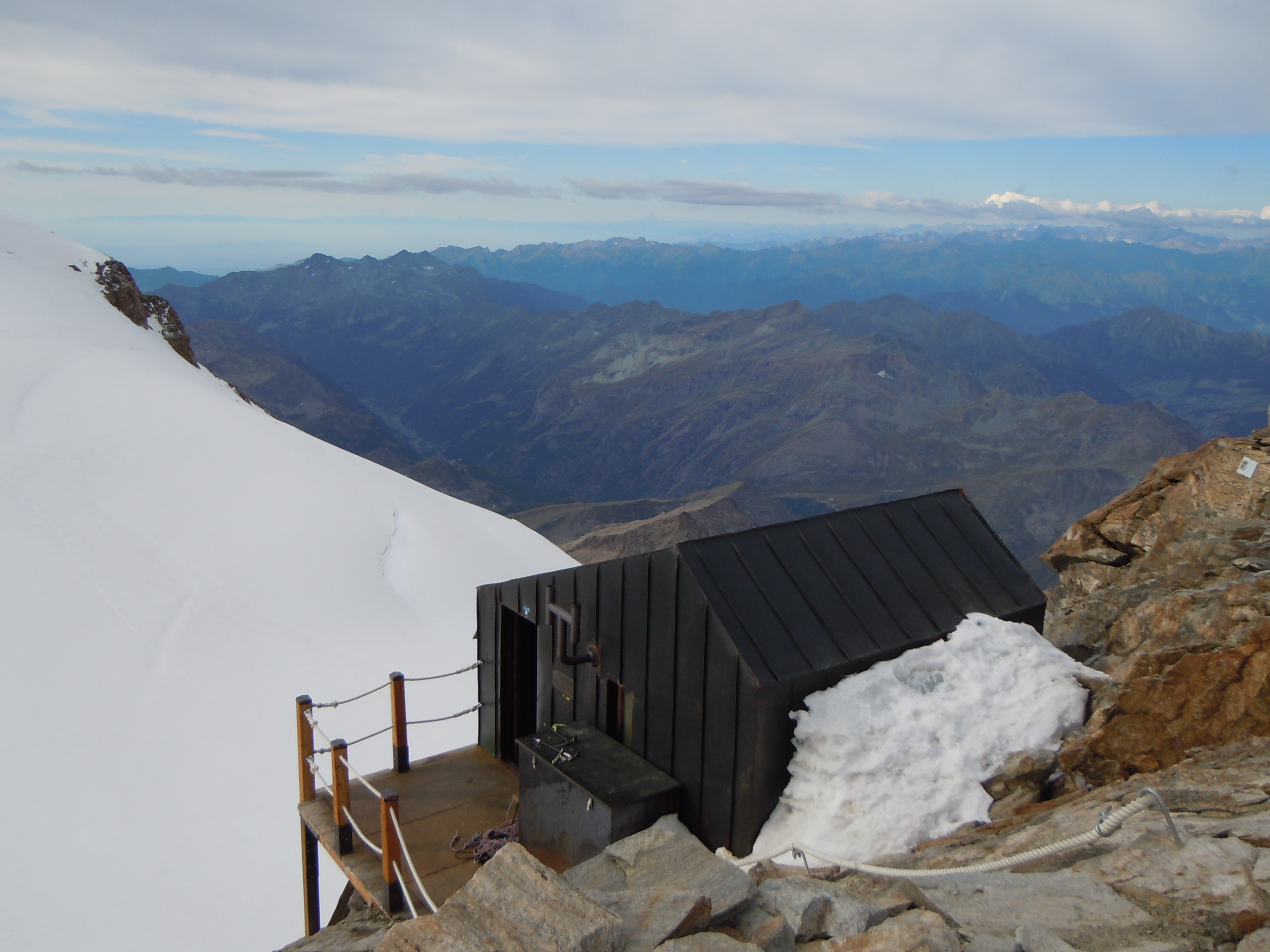 Il bivacco Giordano, nei pressi del Cristo delle Vette